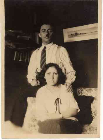 בדירה בלונדון Moshe & Tzippora Sharett in London משה שרת/ צפורה שרת לונדון 06 משה וצפורה 6